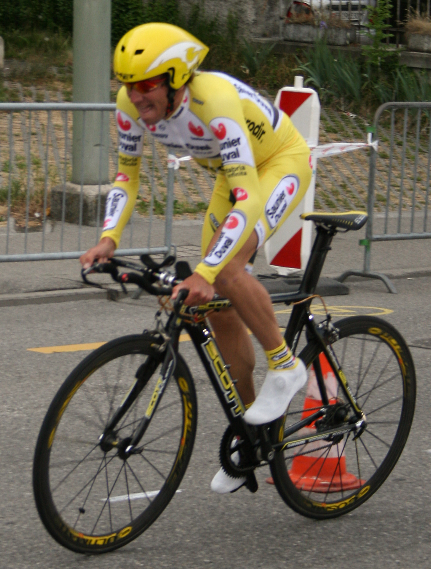 Jose Angel Gomez Marchante prologue du Tour de Romandie 2007